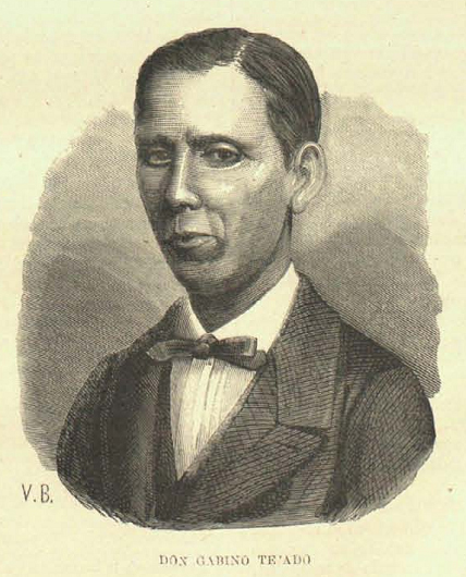 Retrato de Gabino Tejado, recogido en la revista La Ilustración Católica.